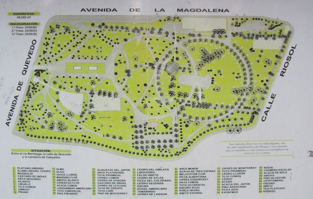 Con ubicación de especies arbóreas